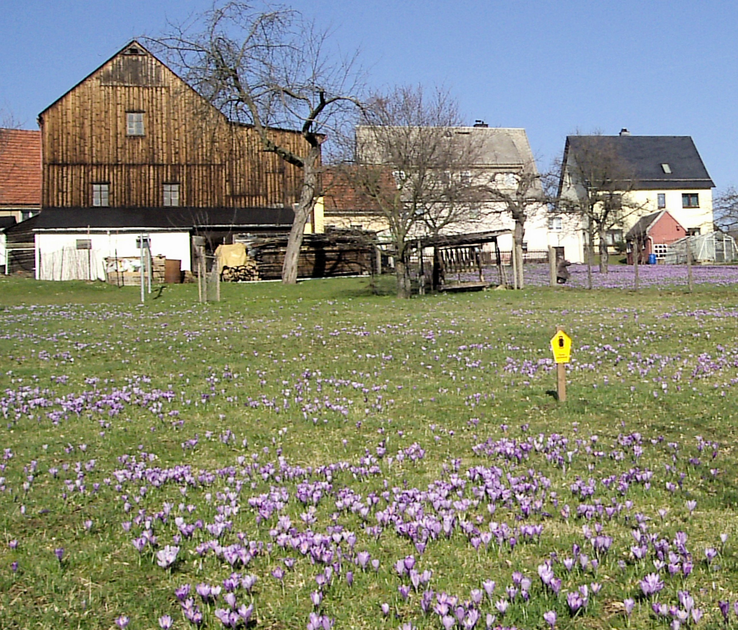 Krokuswiesen in Drebach im Erzgebirge, Deutschland